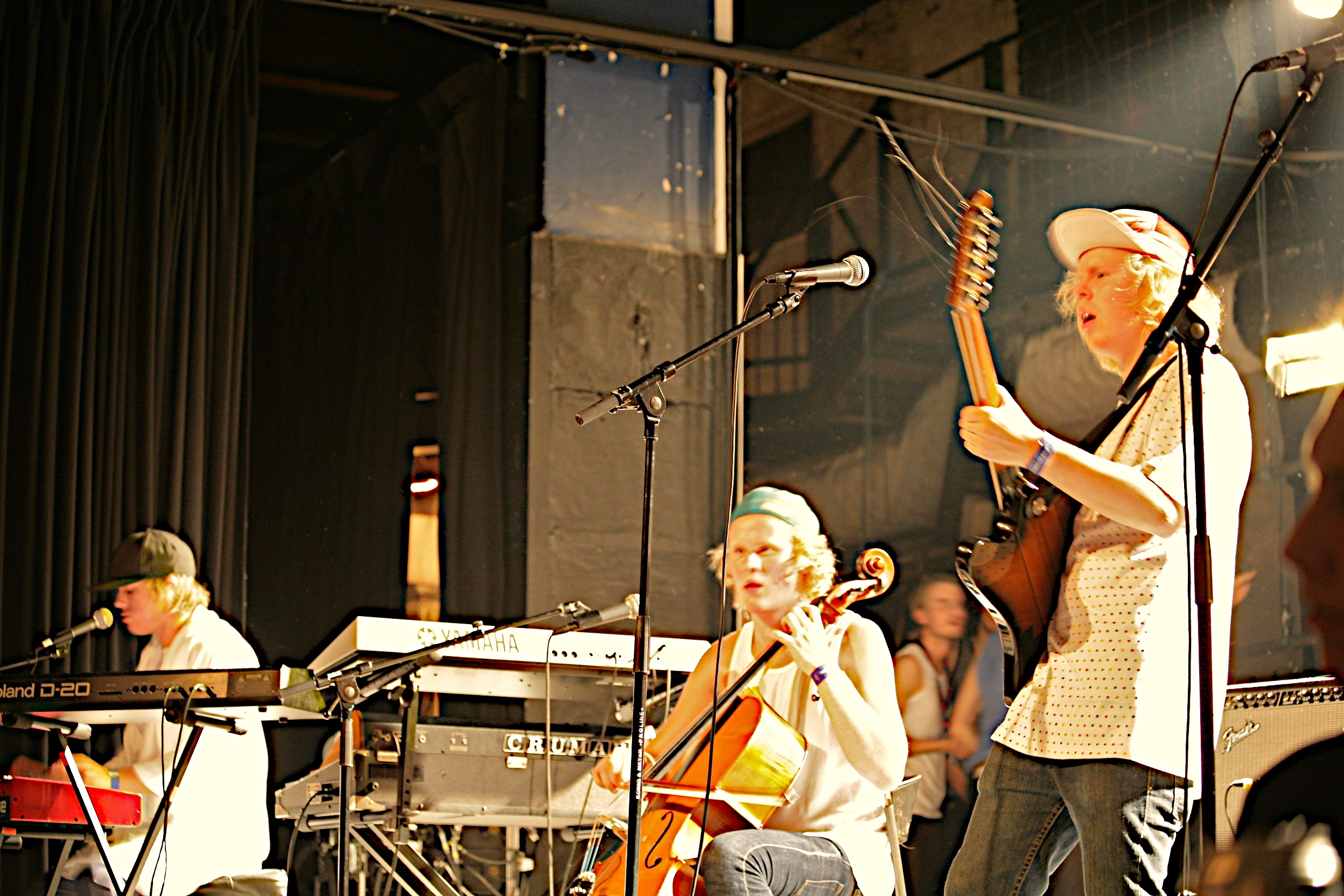 Kakkmaddafakka